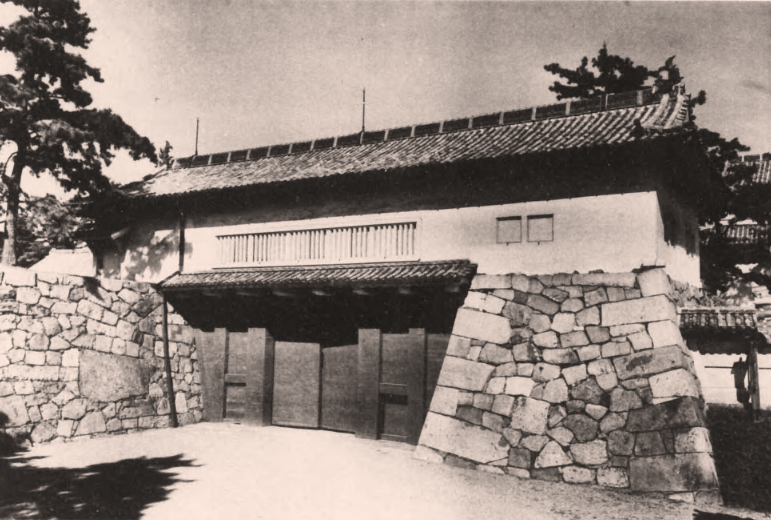 名古屋城 本丸表一之門（焼失）